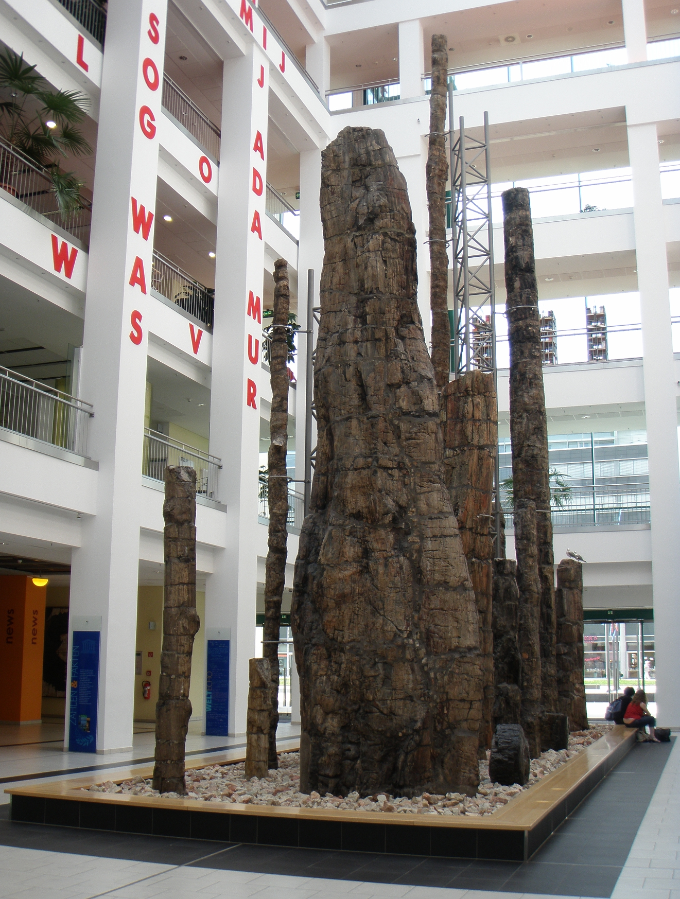 Versteinerter Wald im Museum für Naturkunde Chemnitz, DAStietz, Chemnitz